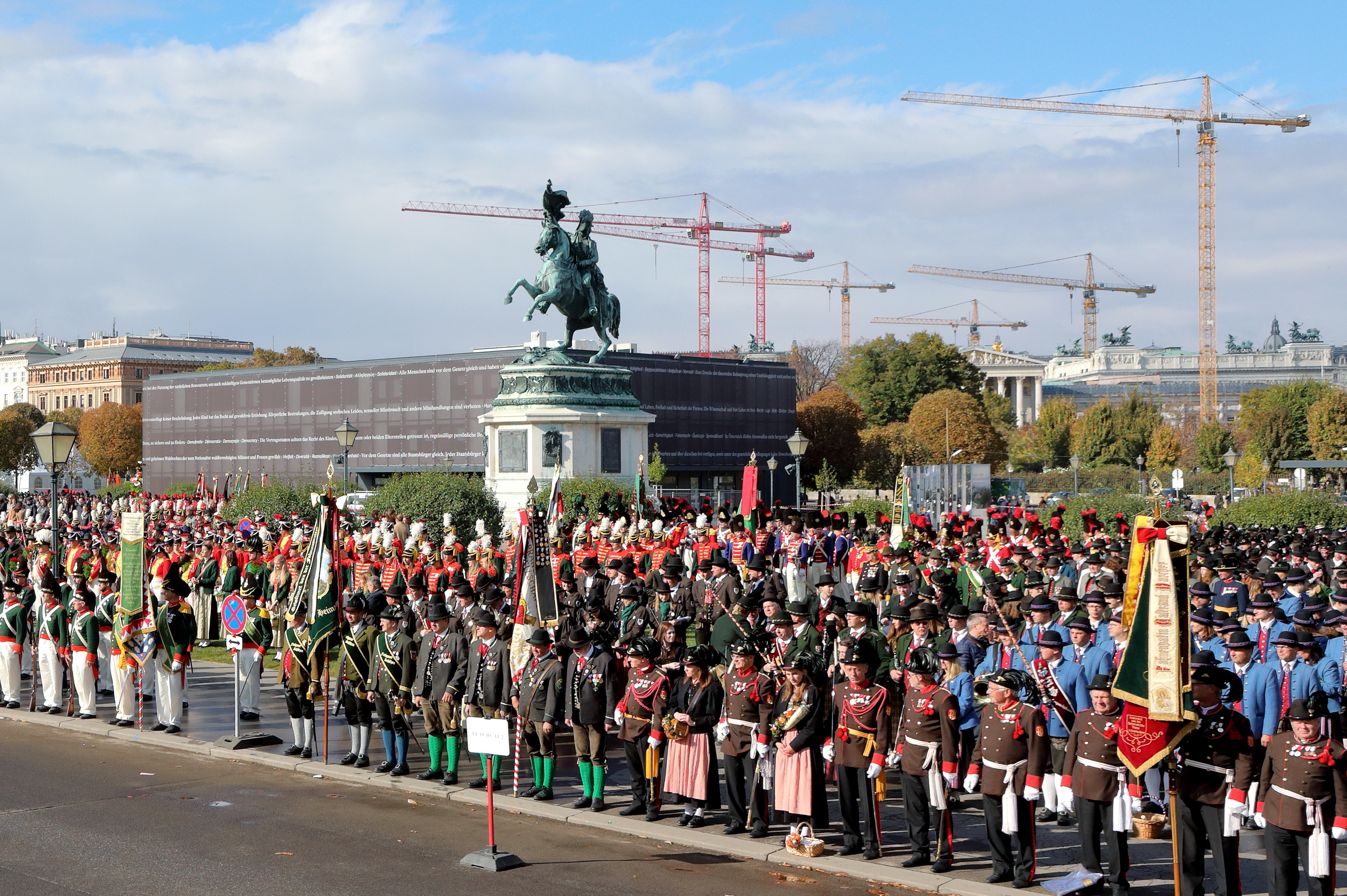 Der Festakt „100 Jahre Republik Österreich“ mit Salzburger Schützen am Heldenplatz im 1. Wiener Bezirk Innere Stadt. Bei dem Festakt am 21. Okt. 2018 nahmen fast 4.000 Salzburger Frauen, Männer und Jugendliche in Trachten (87 Schützenkompanien und 26 Musikkapellen), neben kleineren Abordnungen aus anderen Bundesländern, teil.